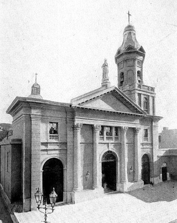 Fachada de la Parroquia de la Inmaculada Concepción en 1930.